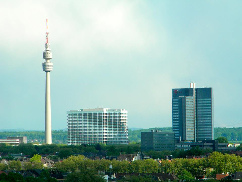 Dortmund Blickrichtung B1 mit Hochhäusern und Florianturm